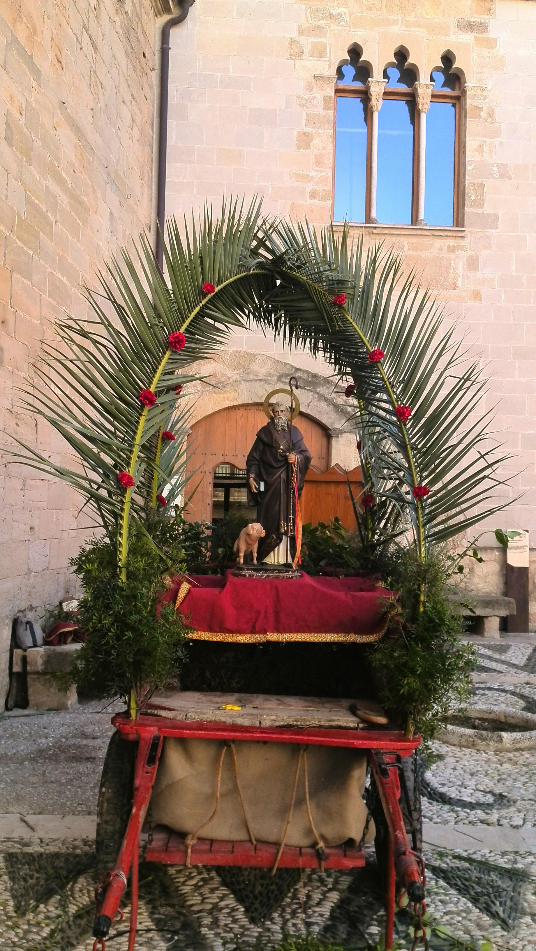 Carro que porta la imatge de sant Antoni a la Festa de sant Antoni de Gandesa el 2015